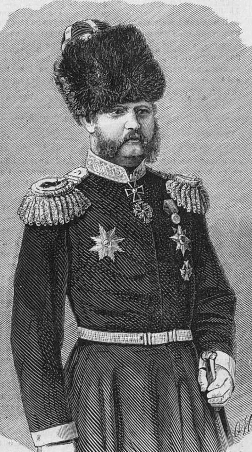 Корсаков Михаил Семёнович, русский государственный деятель